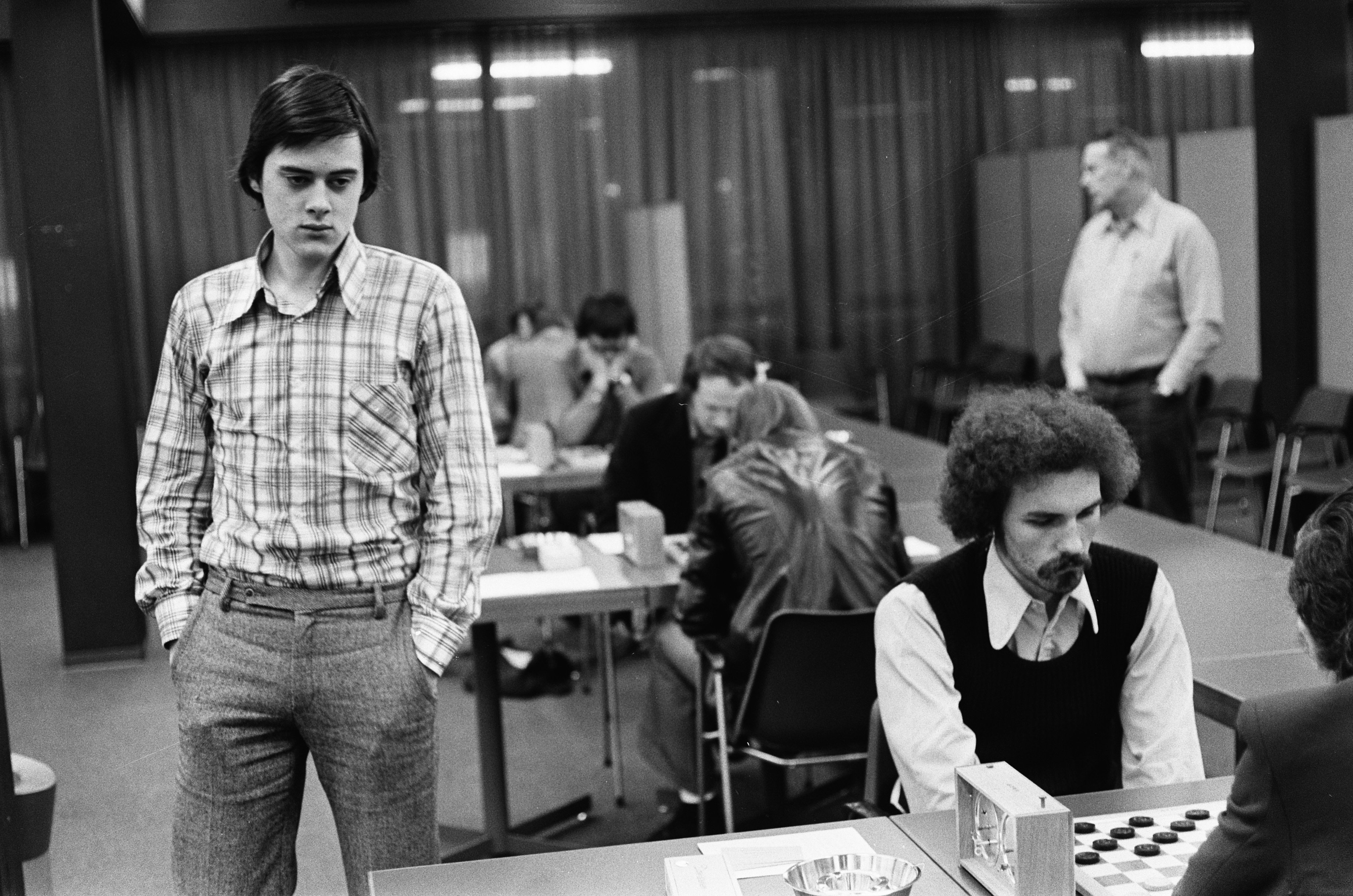 Nederlandse kampioenschap dammen Amsterdam, Jeroen Goudt bij Harm Wiersma (r)